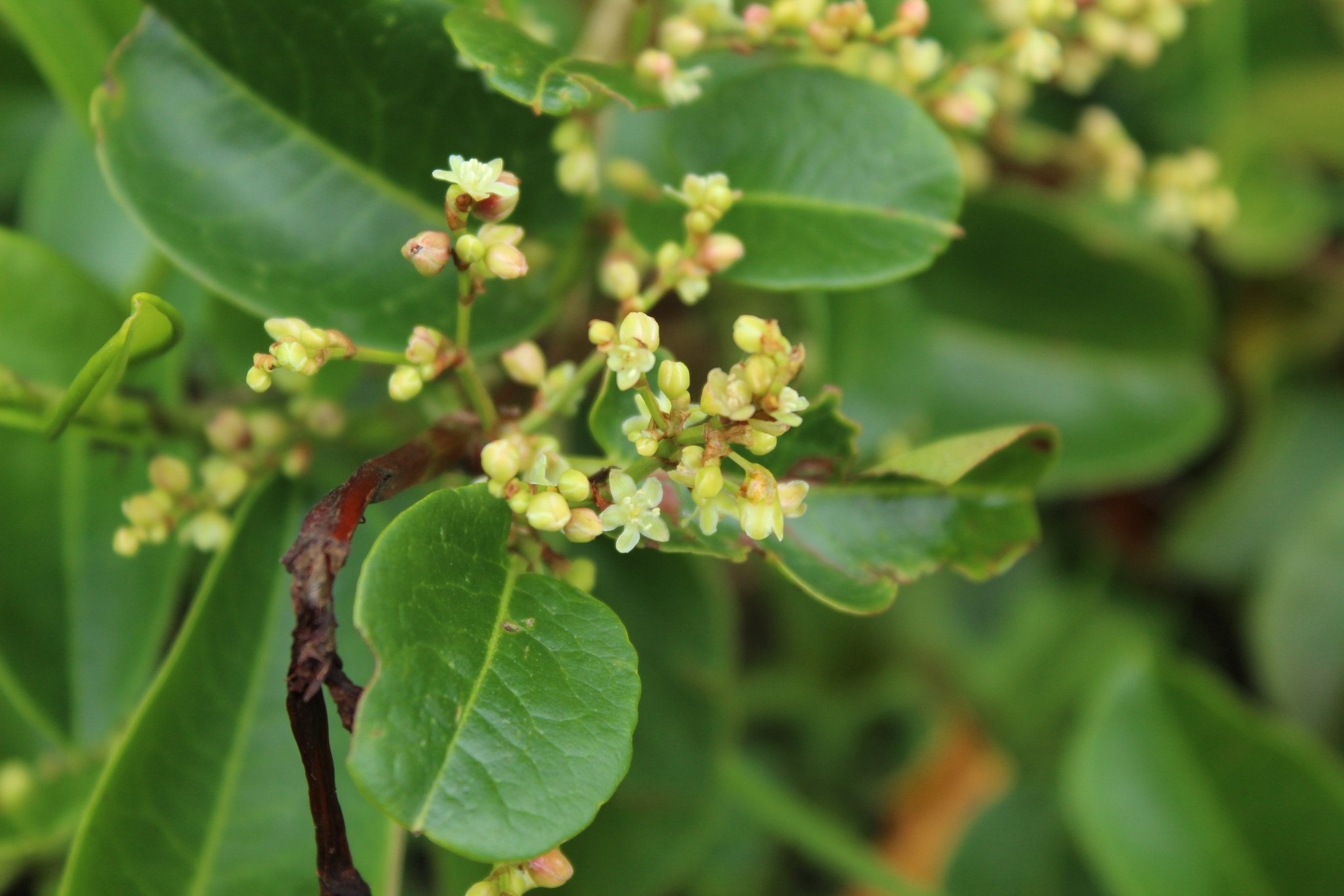 Muehlenbeckia tamnifolia en Tibasosa, Colombia.